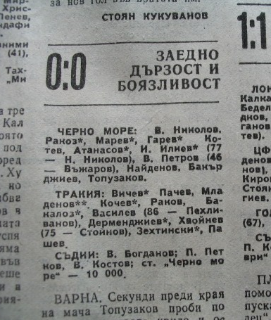 Факсимиле от в-к "Народен спорт", от 27.03.1989 г. Фиш от мача между Черно море - Тракия 0:0, игран на 25.03.1989 г.